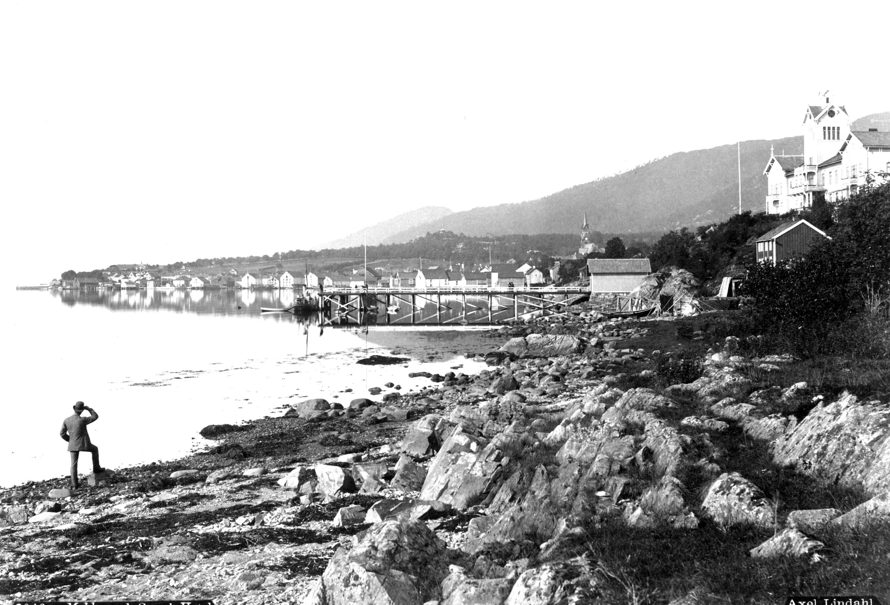 Grand Hotel, Molde.